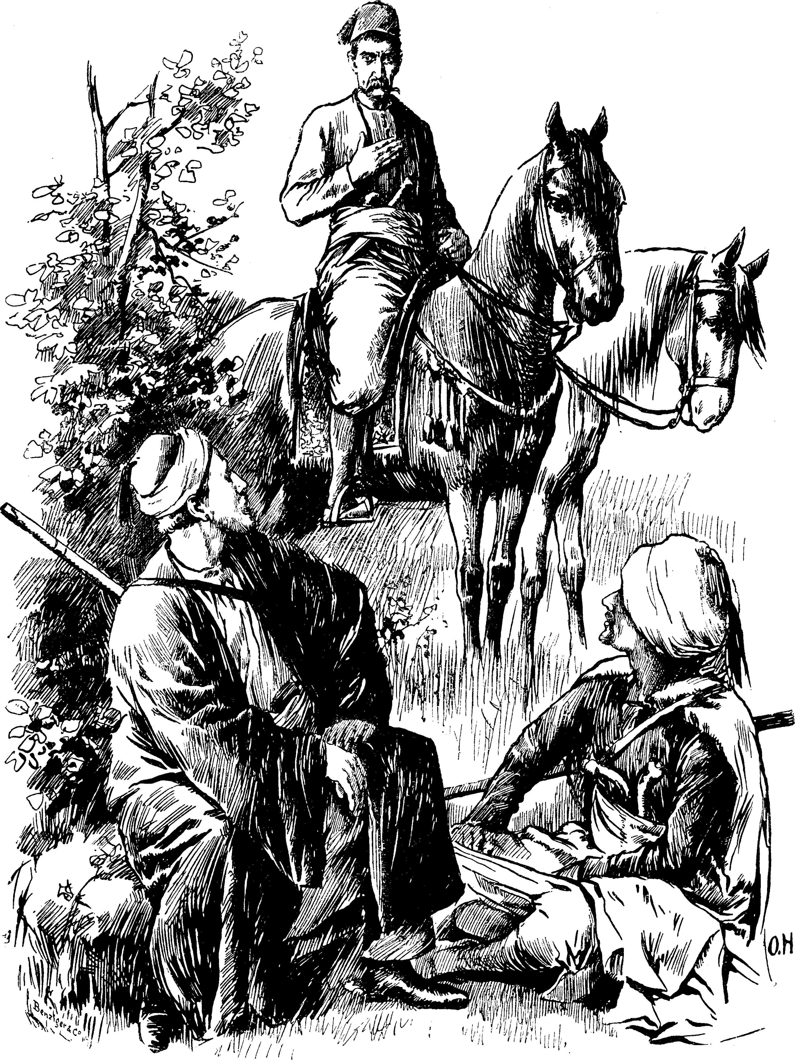 Der Kys-Kaptschiji